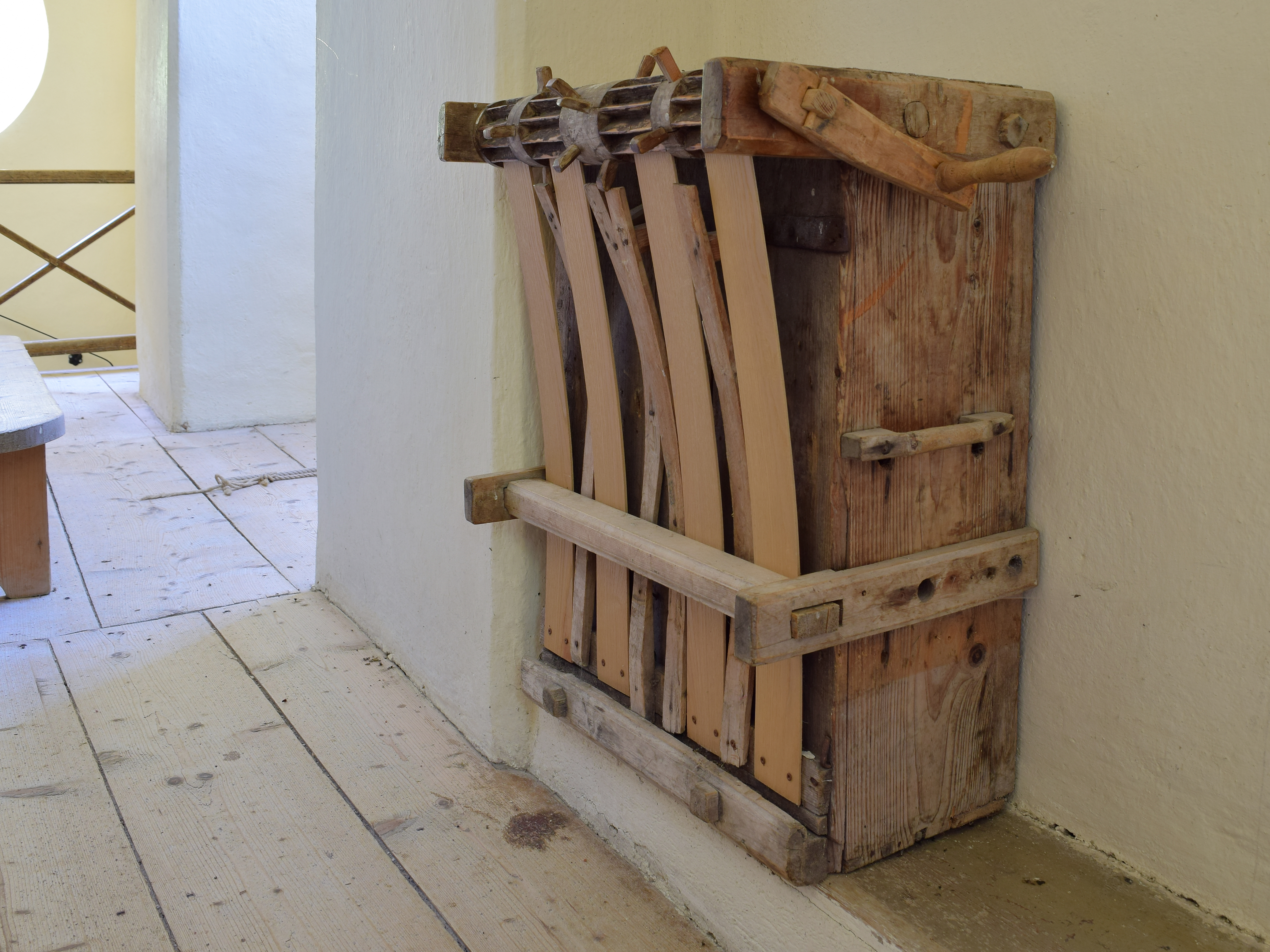 Karfreitagsratsche in der kath. Pfarrkirche Zur Kreuzauffindung in Neuhaus, Gemeinde Gaming in Niederösterreich